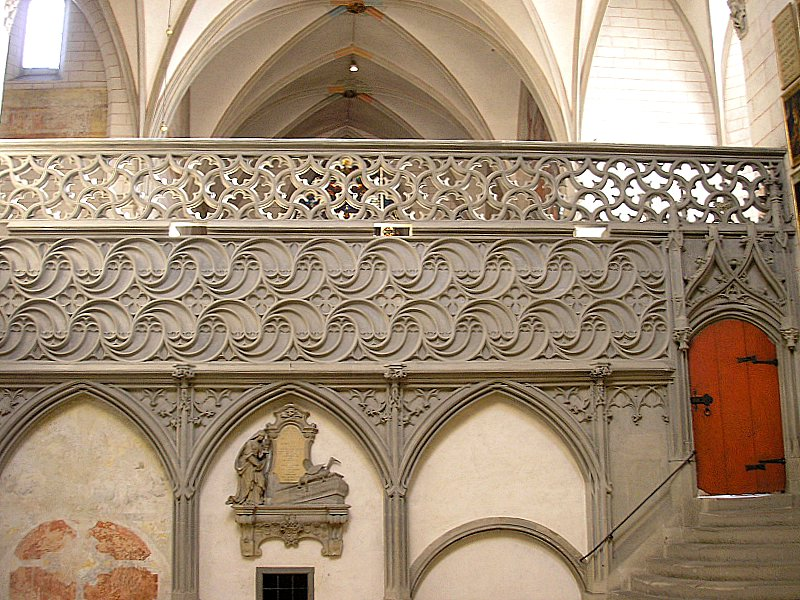 Dom zu Augsburg (Bayerisch-Schwaben). Die Chorschranken des Weetchores. Eigene Aufnahme, März 2007 / Augsburg Cathedral (Bavaria, Germany). The choral barriers of the western choir. Own photo, March 2007